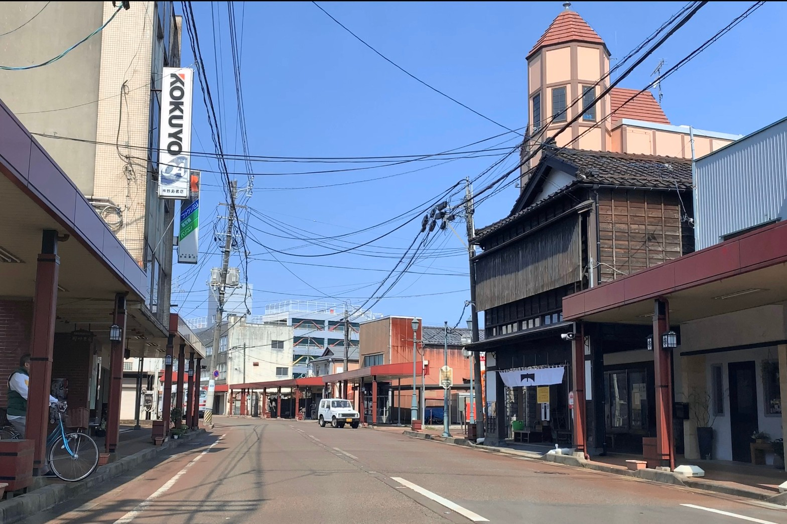 三条市の一の木戸商店街。奥の立体駐車場は「パルム3」。（2020年4月）新潟県道331号三条下田線